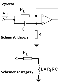 Schemat żyratora na podstawie grafiki w angielskim wikicommons.